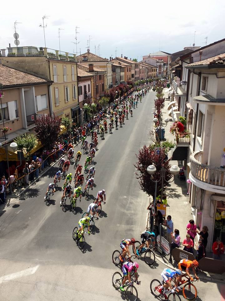 I partecipanti al Giro d'Italia 2015 attraversano il centro di Conselice